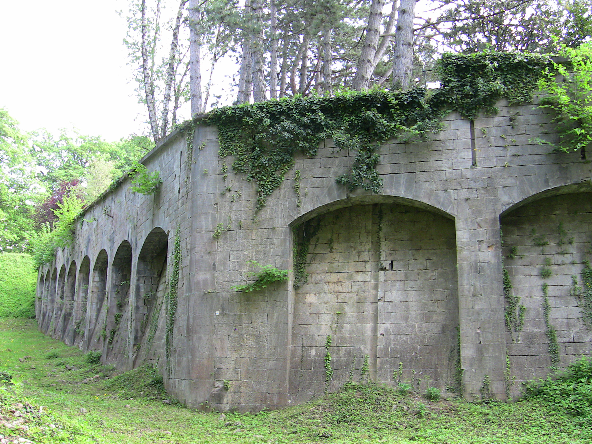 Remparts ouest et nord (erreur de titre) du fort de Beauregard à Besançon (Doubs, France).